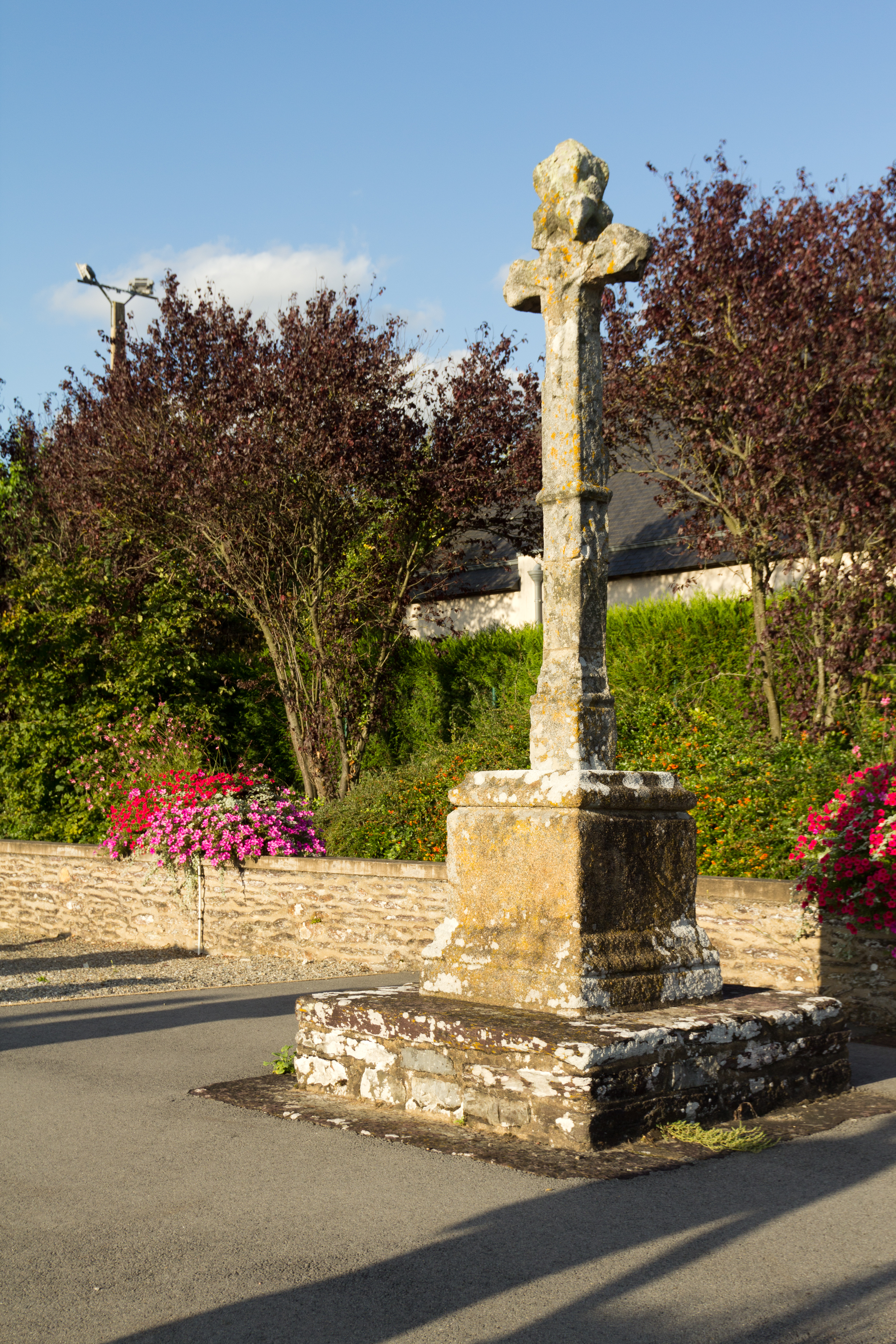 Croix du XVIème siècle située dans le nouveau cimetière de Saint-Erblon. .